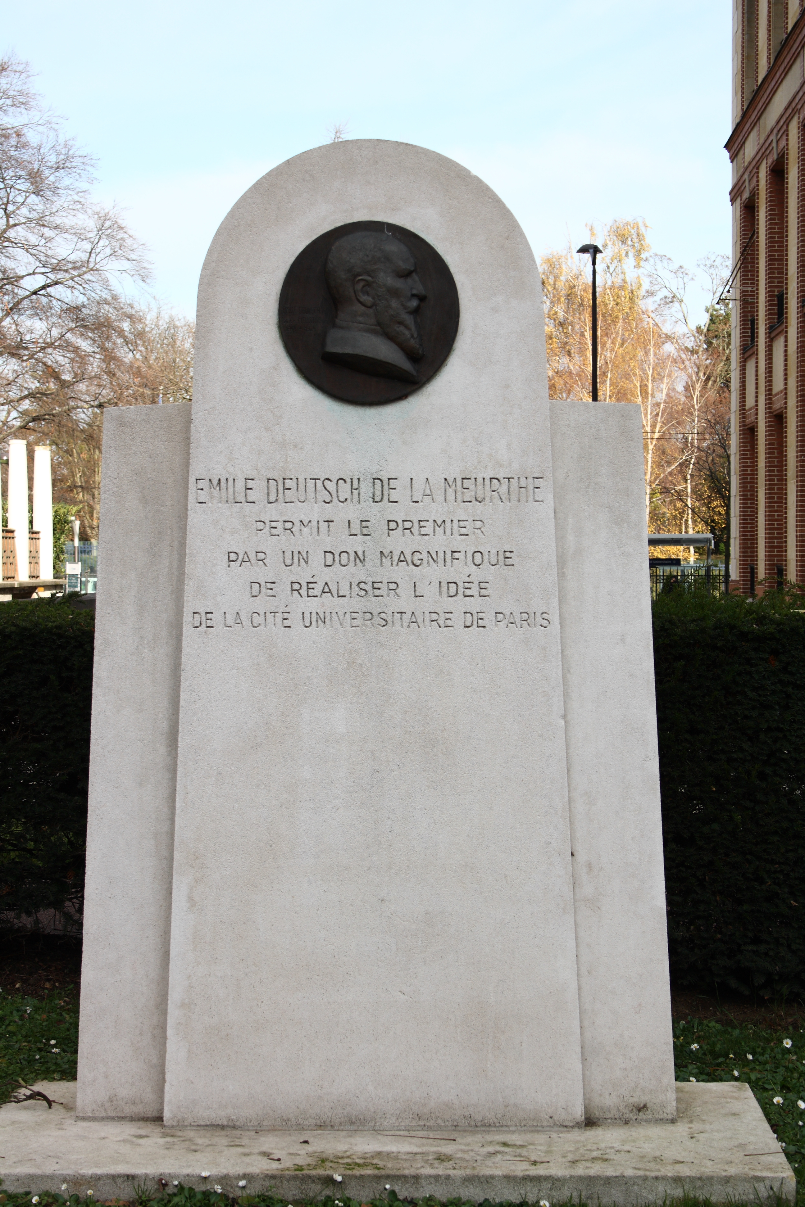 Gedenktafel an Émile Deutsch de la Meurthe in Paris (14. Arrondissement) in der Cité Internationale Universitaire de Paris